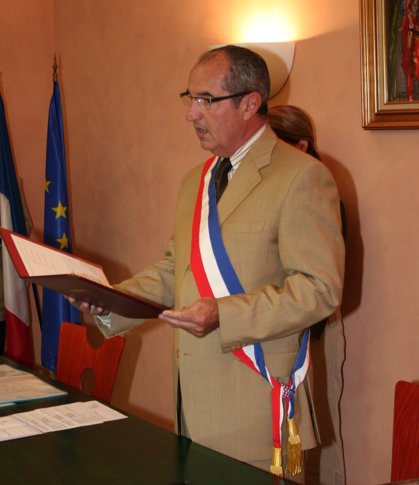 Photos de Dominique Juillot dans son rôle de maire de Mercurey (pour un mariage)